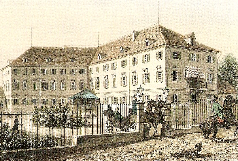 Königliches Kurhaus Bad Kissingen im Jahr 1845